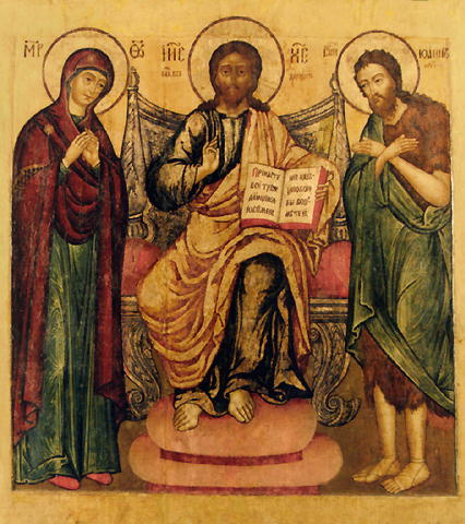 Деисус. Из иконостаса придела Гурия и Самсона церкви Илии Пророка, Ярославль